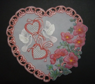 pergamano